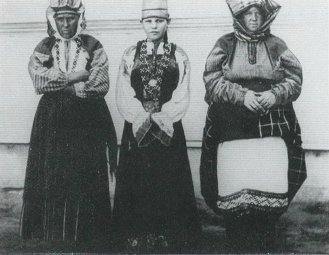 Народный костюм